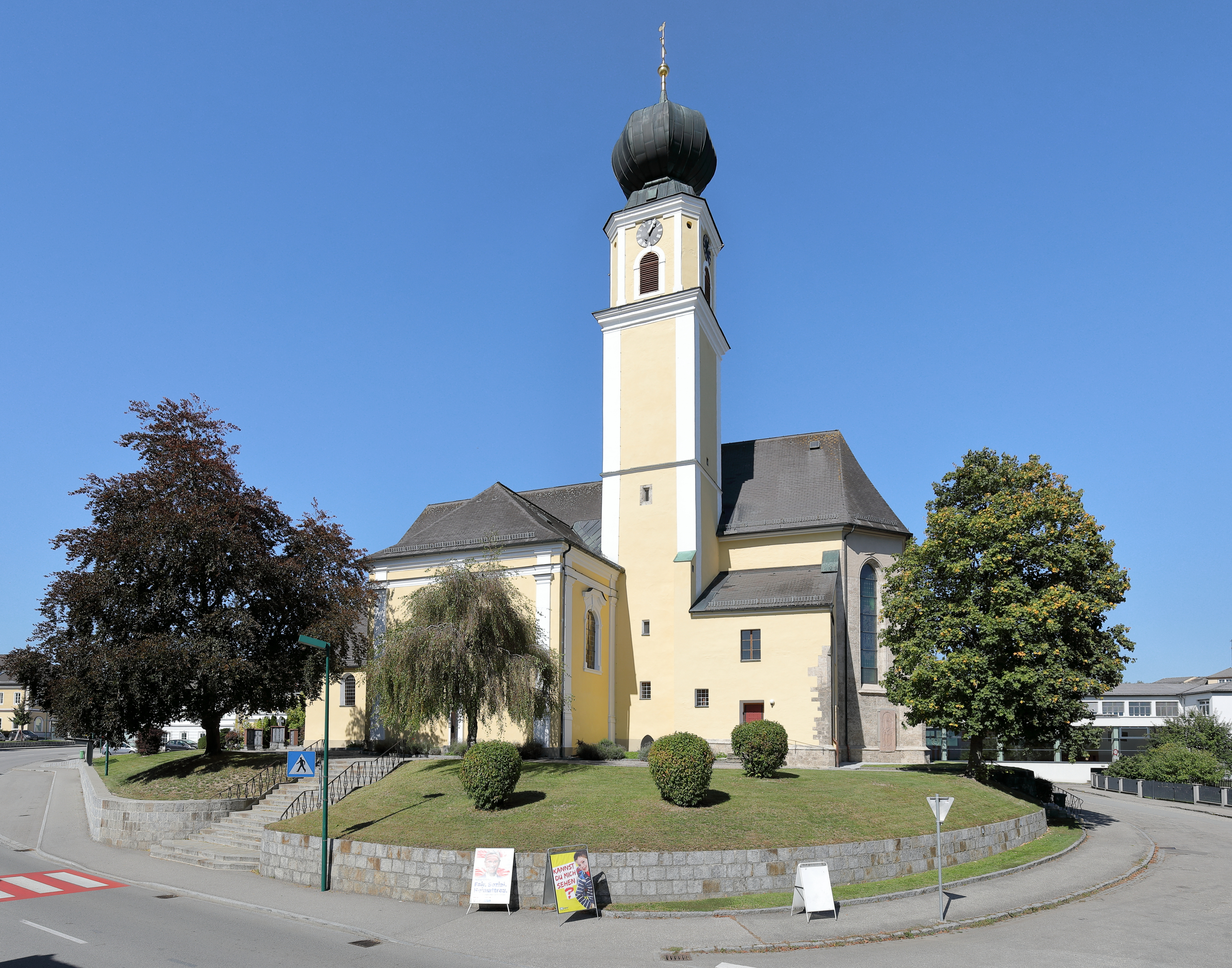 Südostansicht der röm.-kath. Pfarrkirche hl. Mauritius in der oberösterreichischen Marktgemeinde Aurolzmünster.Ursprünglich eine spätgotische Kirche, die von 1729 bis 1735 im Barockstil aus- und umgebaut wurde. Der an der Südseite der Kirche angebaute Turm trug vor dem Brand im Jahre 1672 ein Spitzdach. 1718 wurde der Zwiebelhelm aufgebracht.